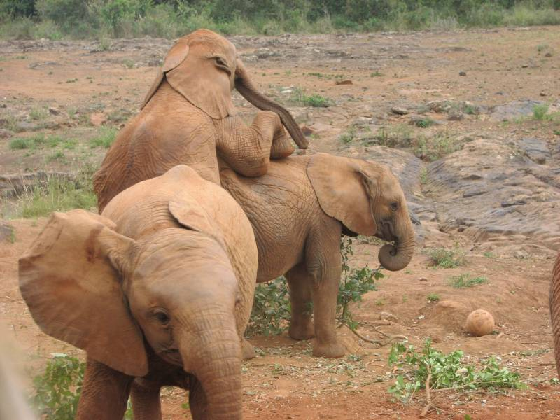 Elefantenwaisen beim Spielen in der Daphne Sheldricks Orphanage